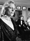 Françoise Dior et son époux Hubert de Mirleau. Photo François-Xavier Seren